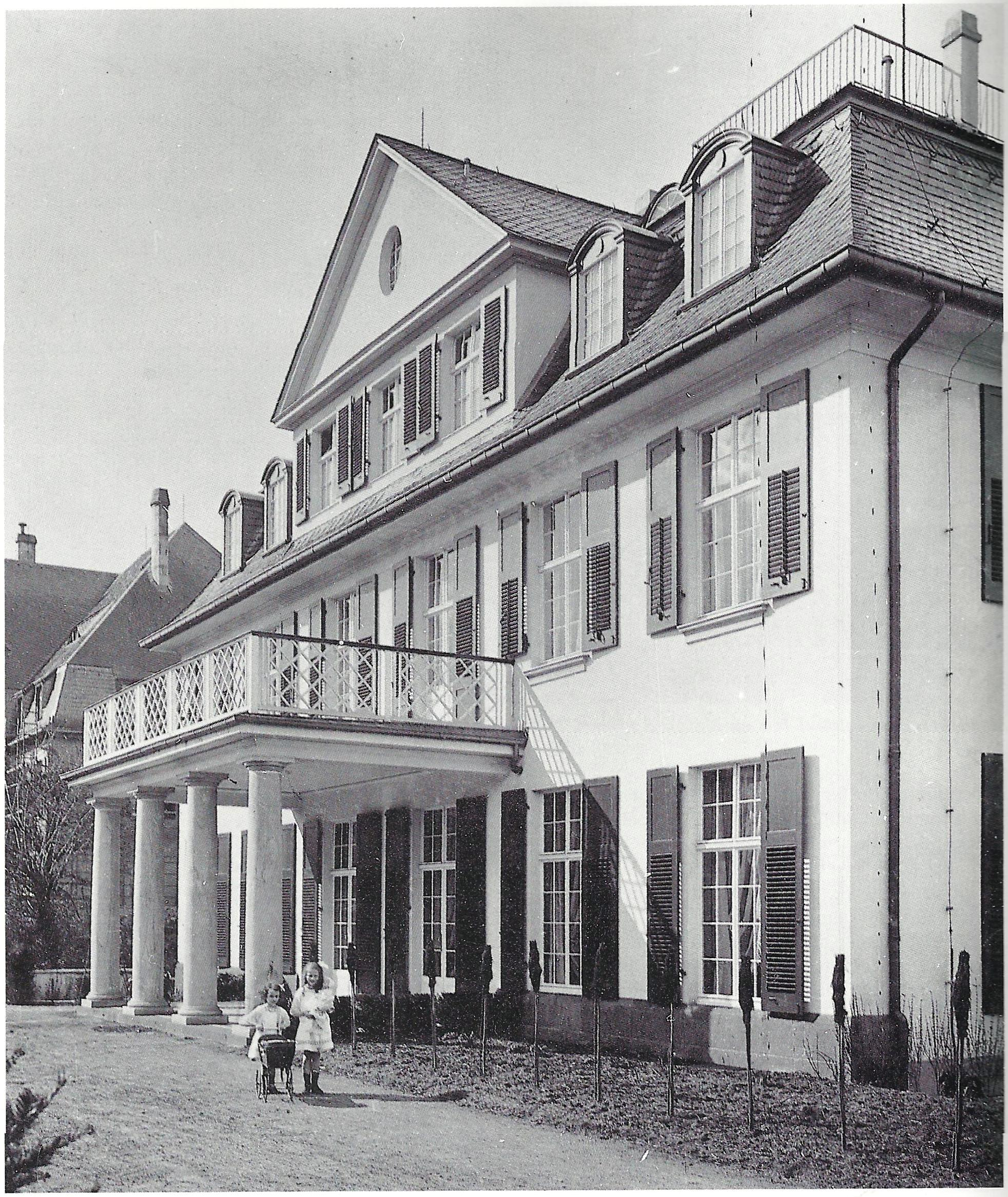 Villa Strack, Bayenthalgürtel 9, Köln-Marienburg: Südseite